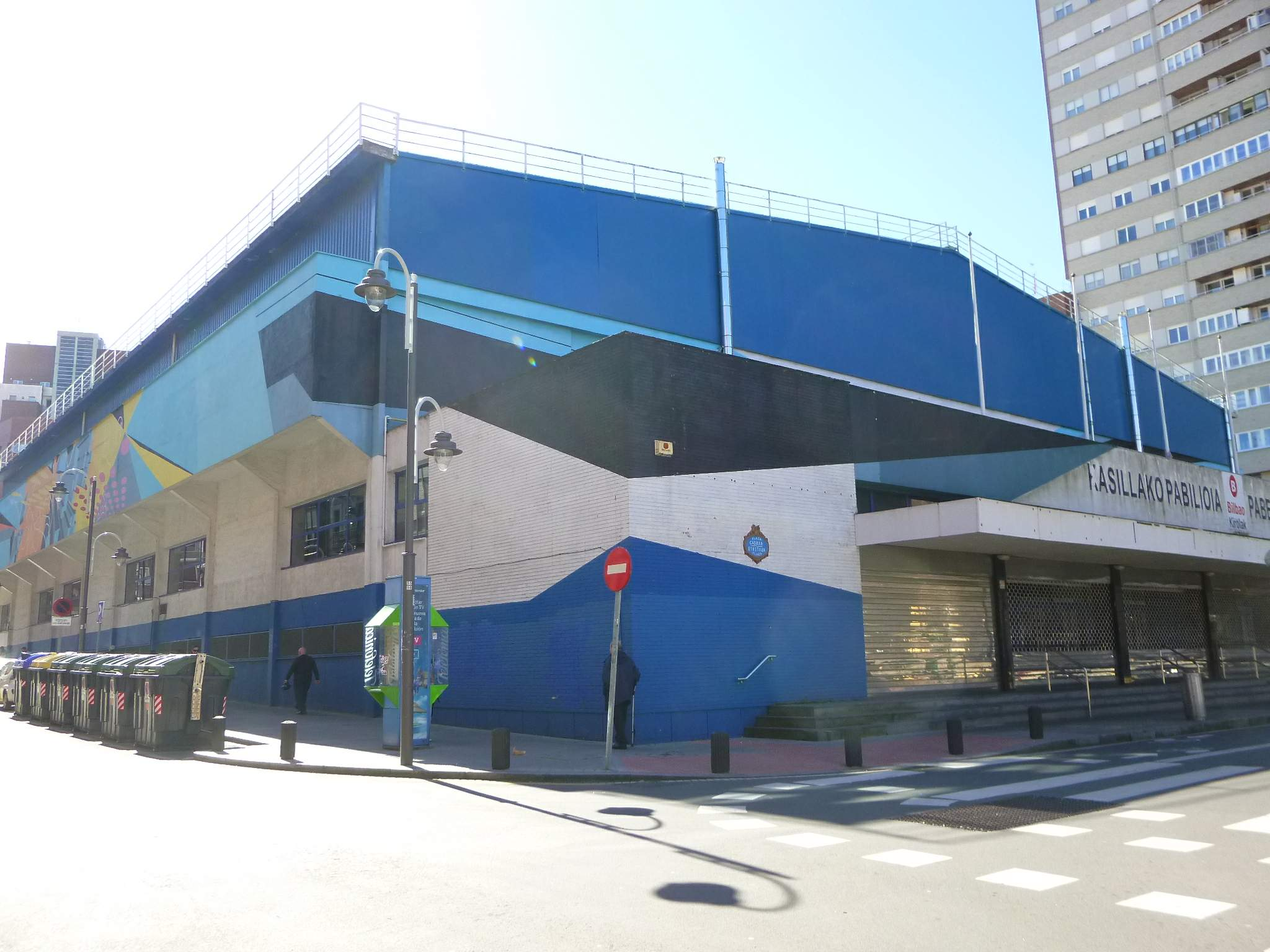 Pabellón de deportes La Casilla (Bilbao)